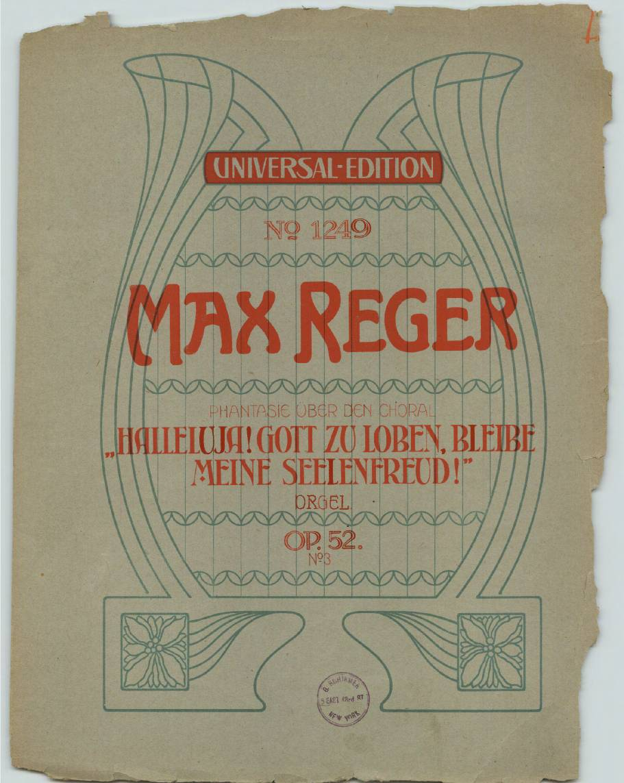 Titelblatt der Erstausgabe der Fantasie über den Choral "Hallelujah! Gott zu loben"